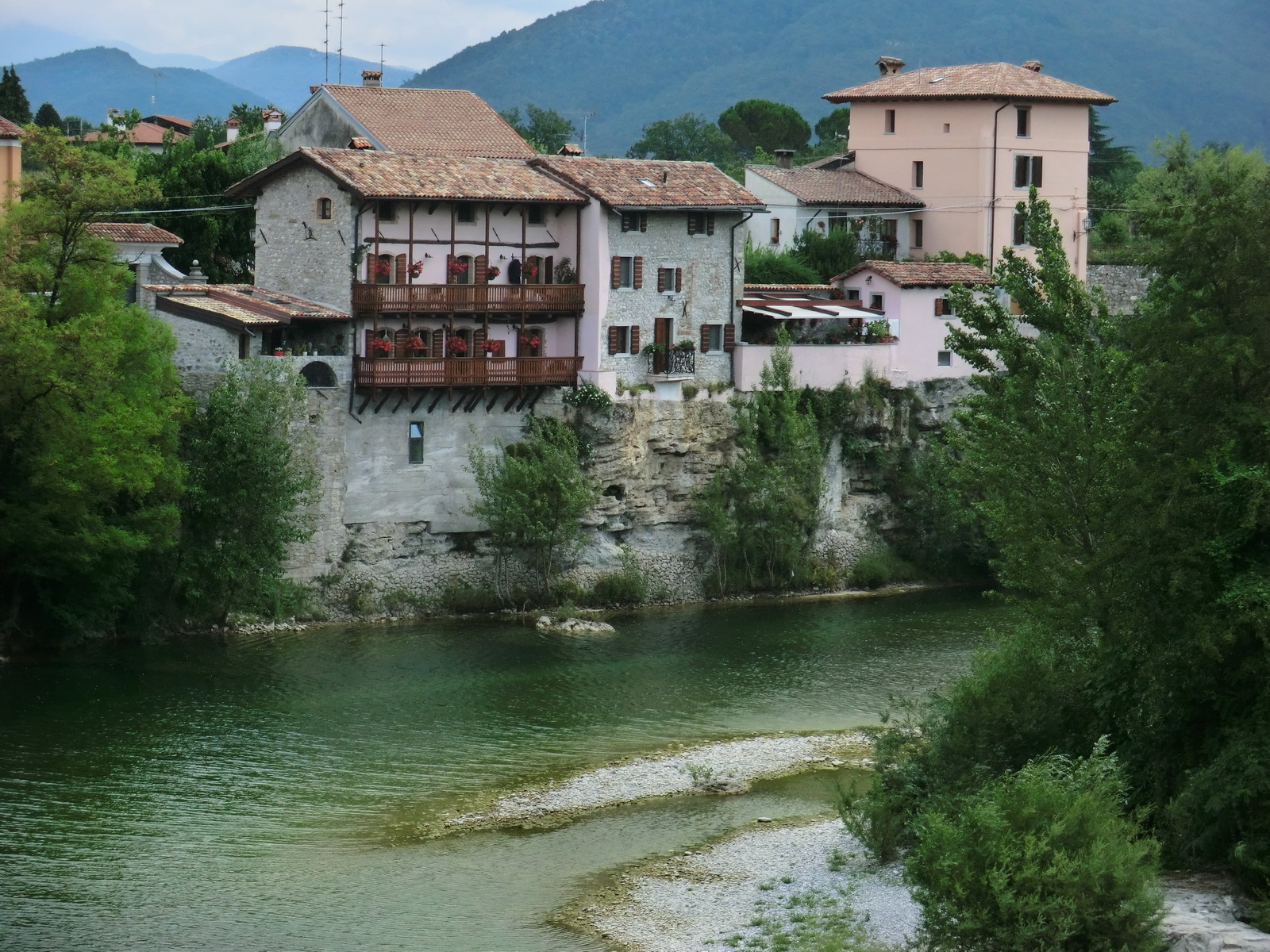 Cividale del Friuli, Friuli-Venezia Giulia, Italy